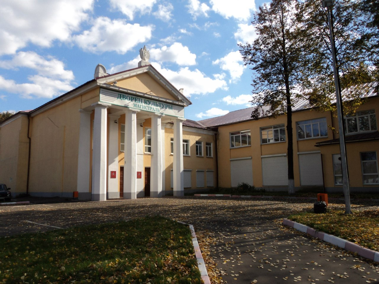 в настоящее время переименован в ДК "Магистраль"